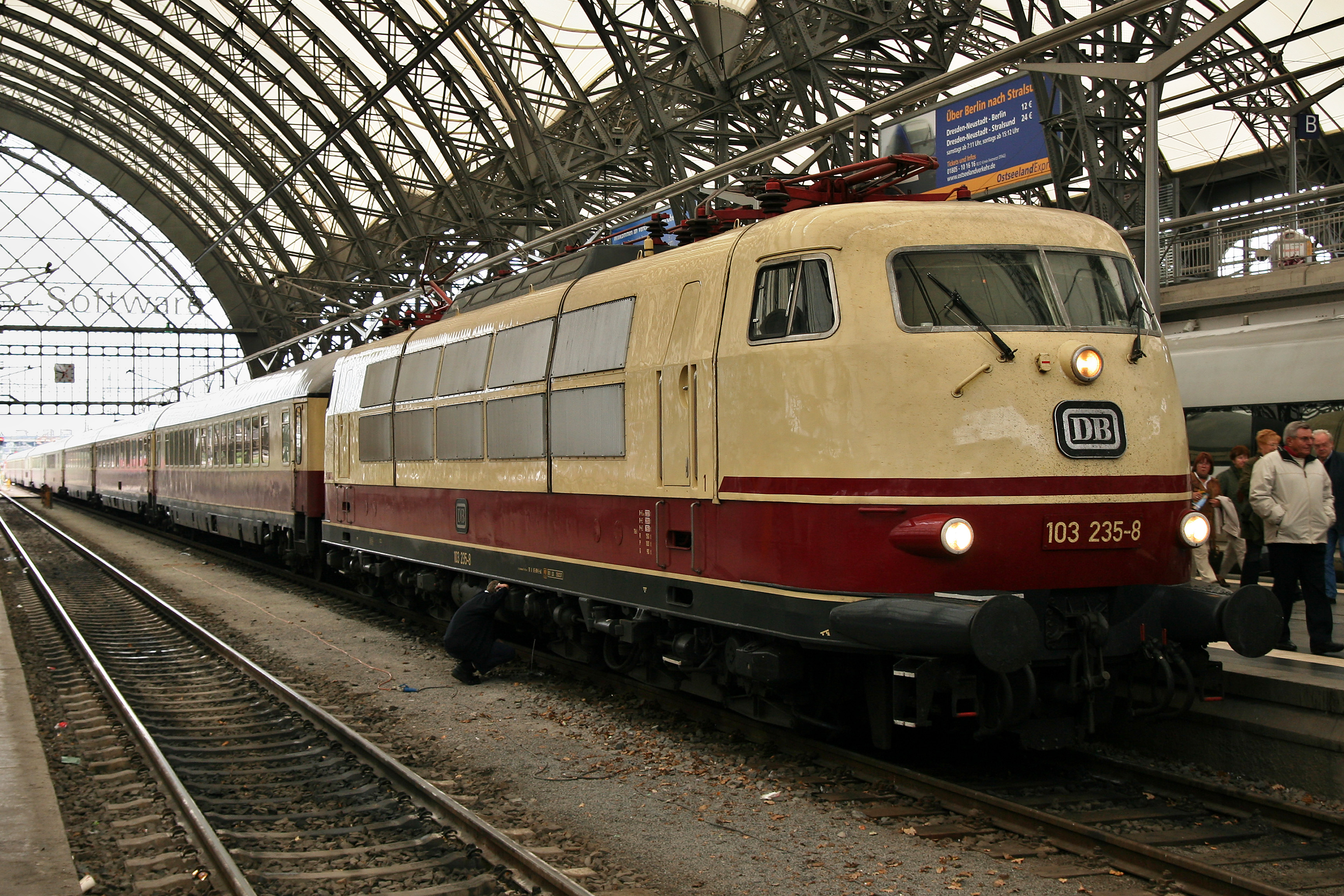 Eine Lokomotive der Baureihe 103 mit einem Sonderzug in Dresden Hbf